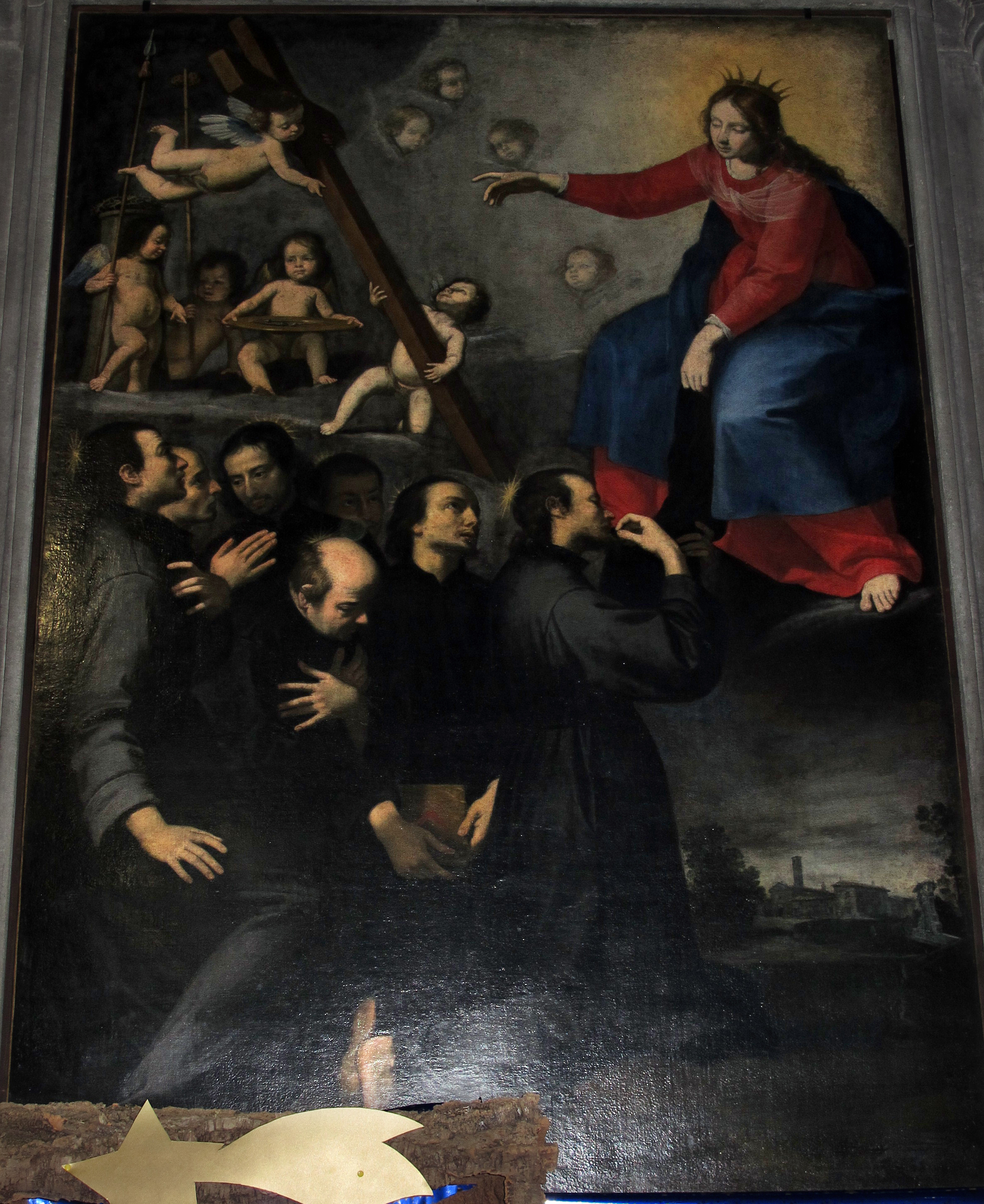 Santa Maria ad Antella